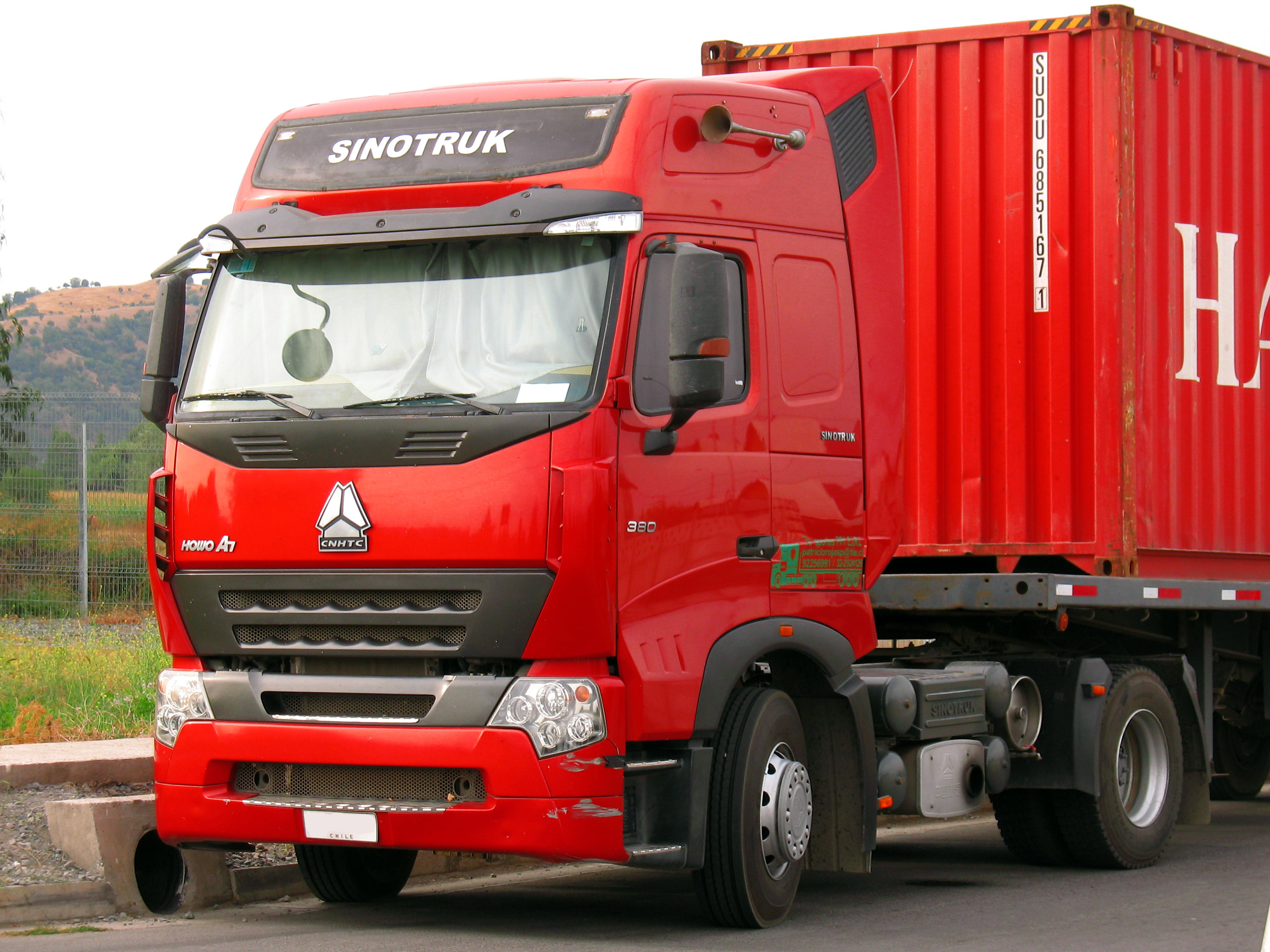 Sinotruk Howo A7 380 2012